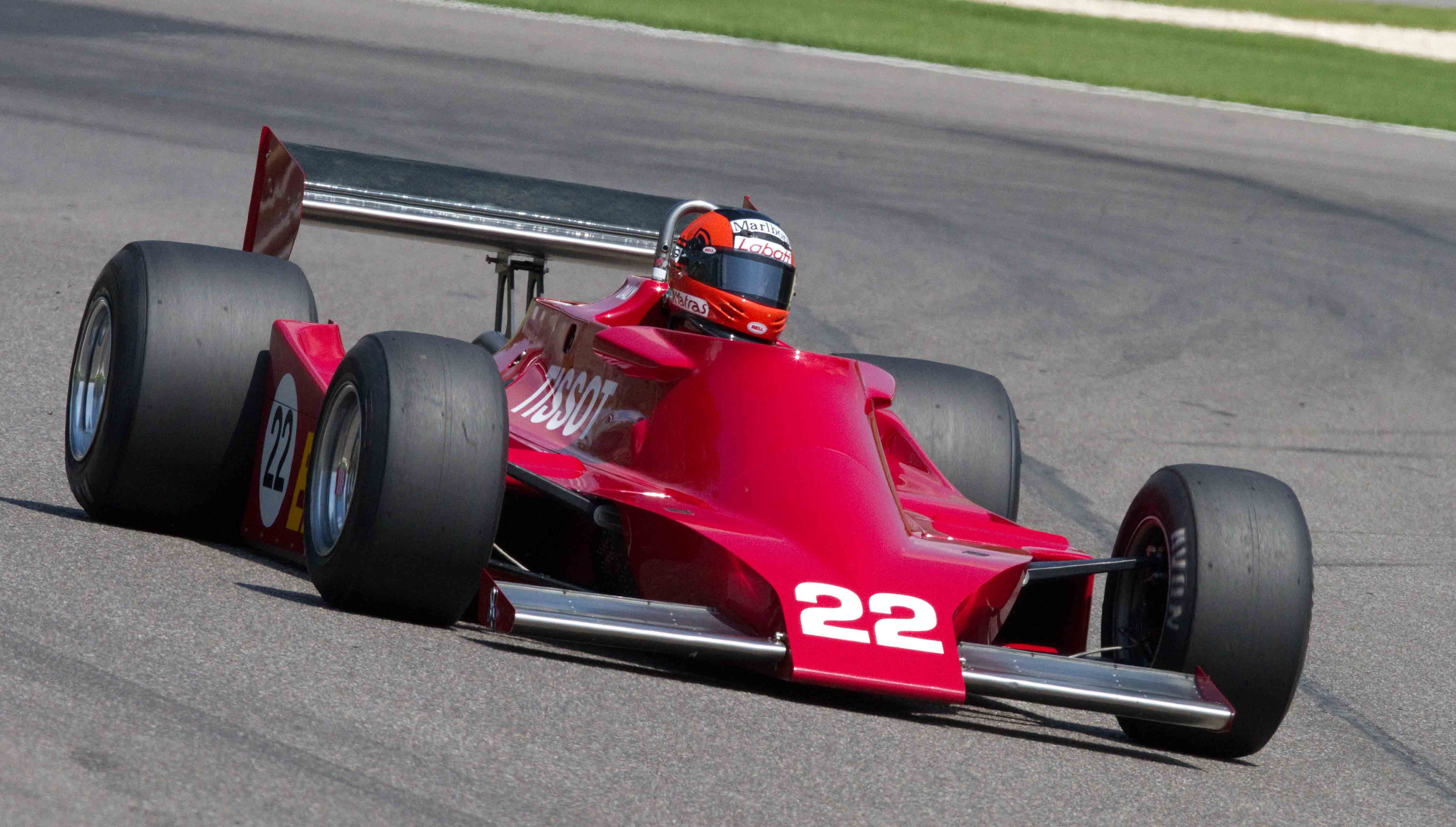 Derek Daly`s Ensign N177 at Barber Motorsports Park, 2010